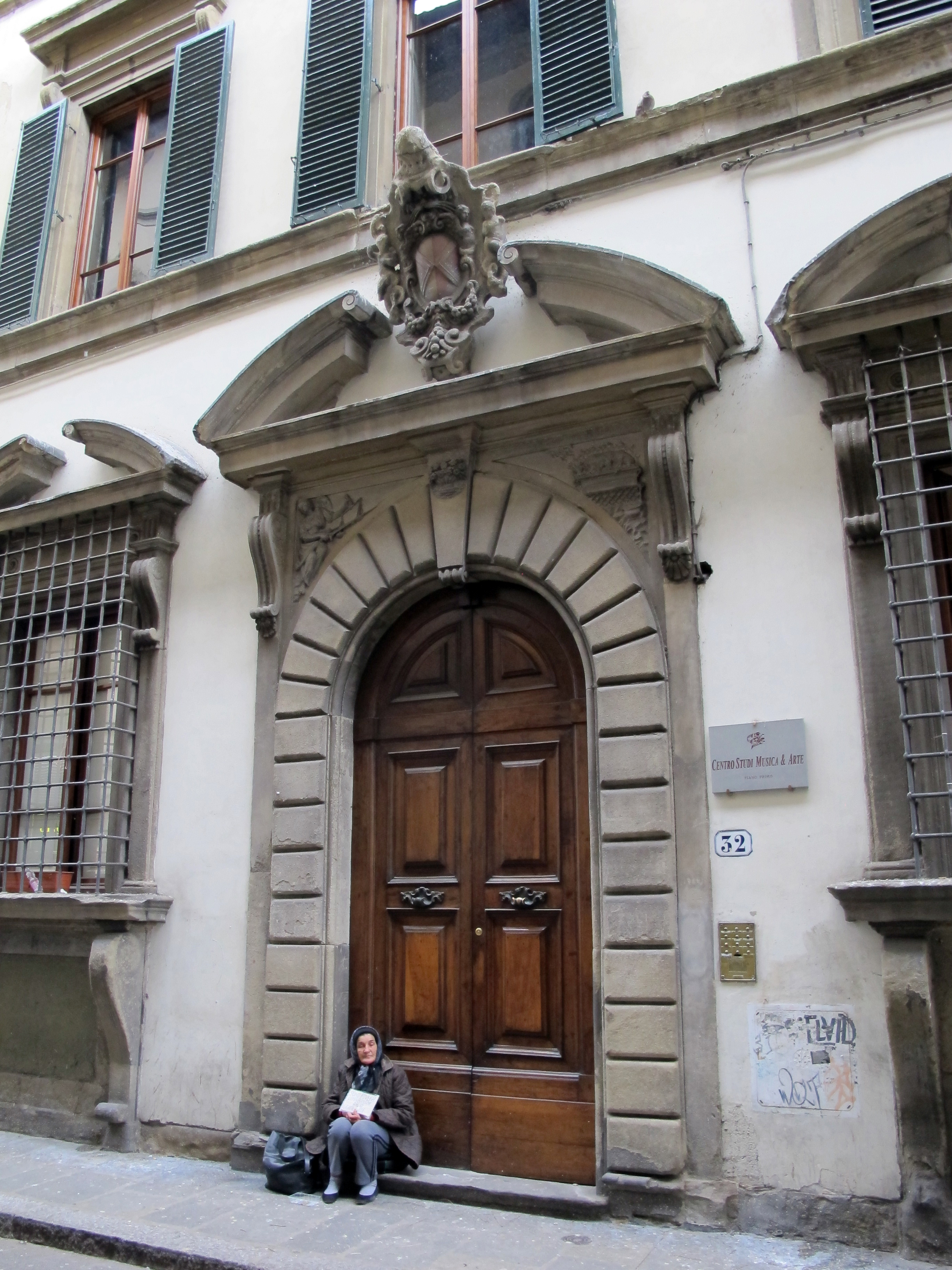 Via pietrapiana 32, palazzo fioravanti